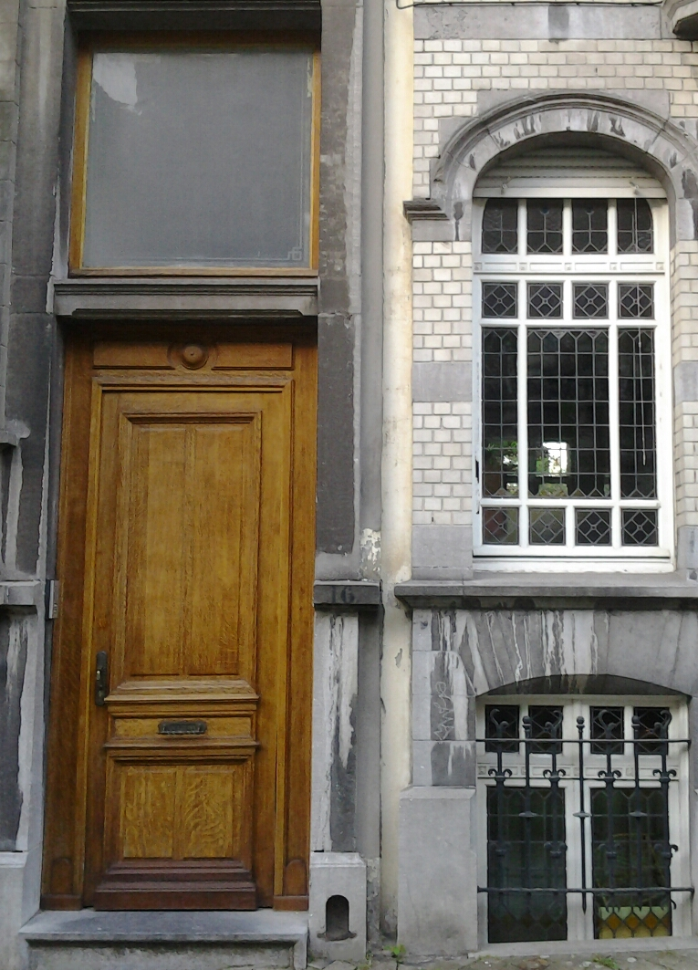 Porte néoclassique du numéro o 16 de 1899 .